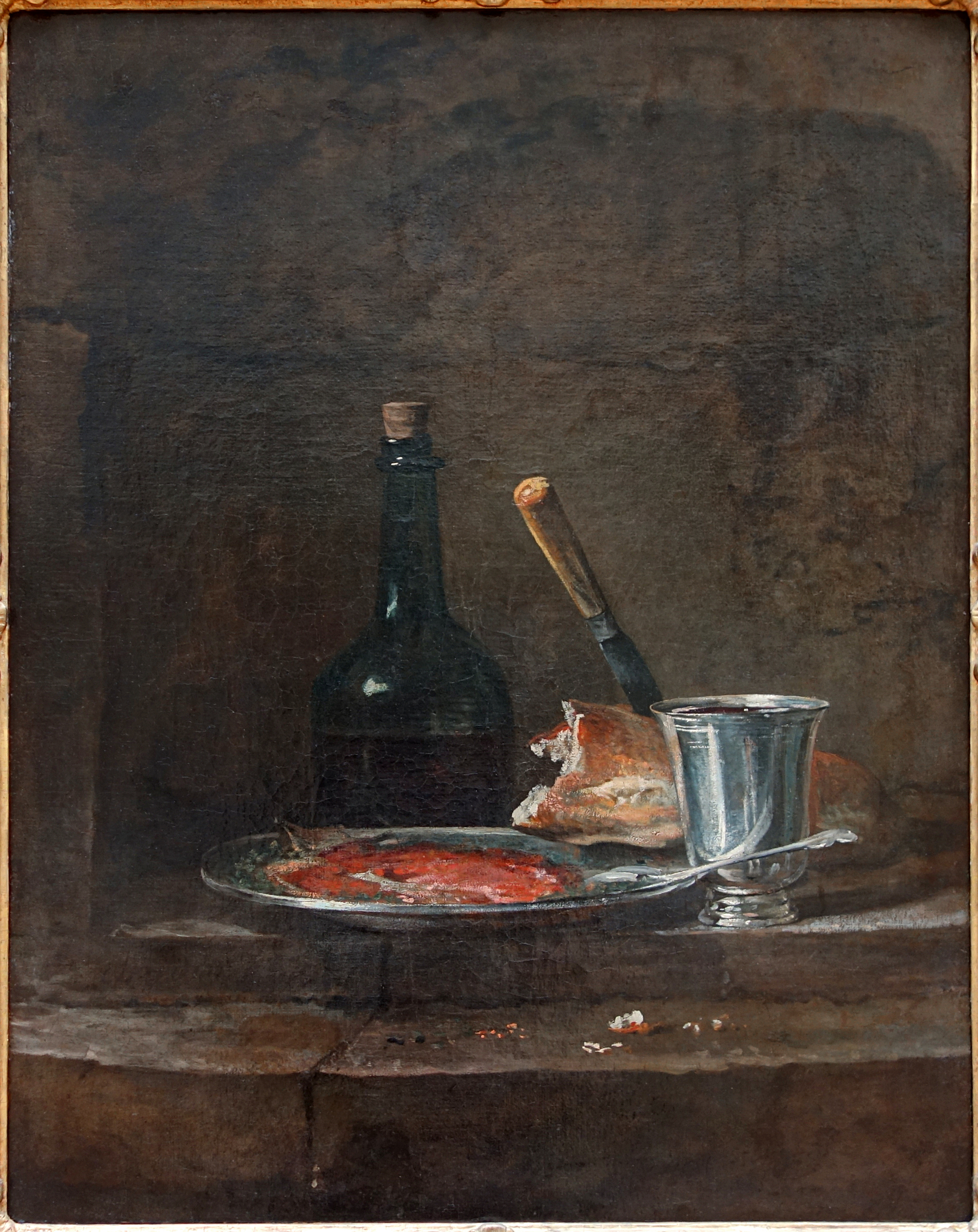 Les apprêts d'un déjeuner ou Le gobelet d'argent au Palais des Beaux-arts de Lille.